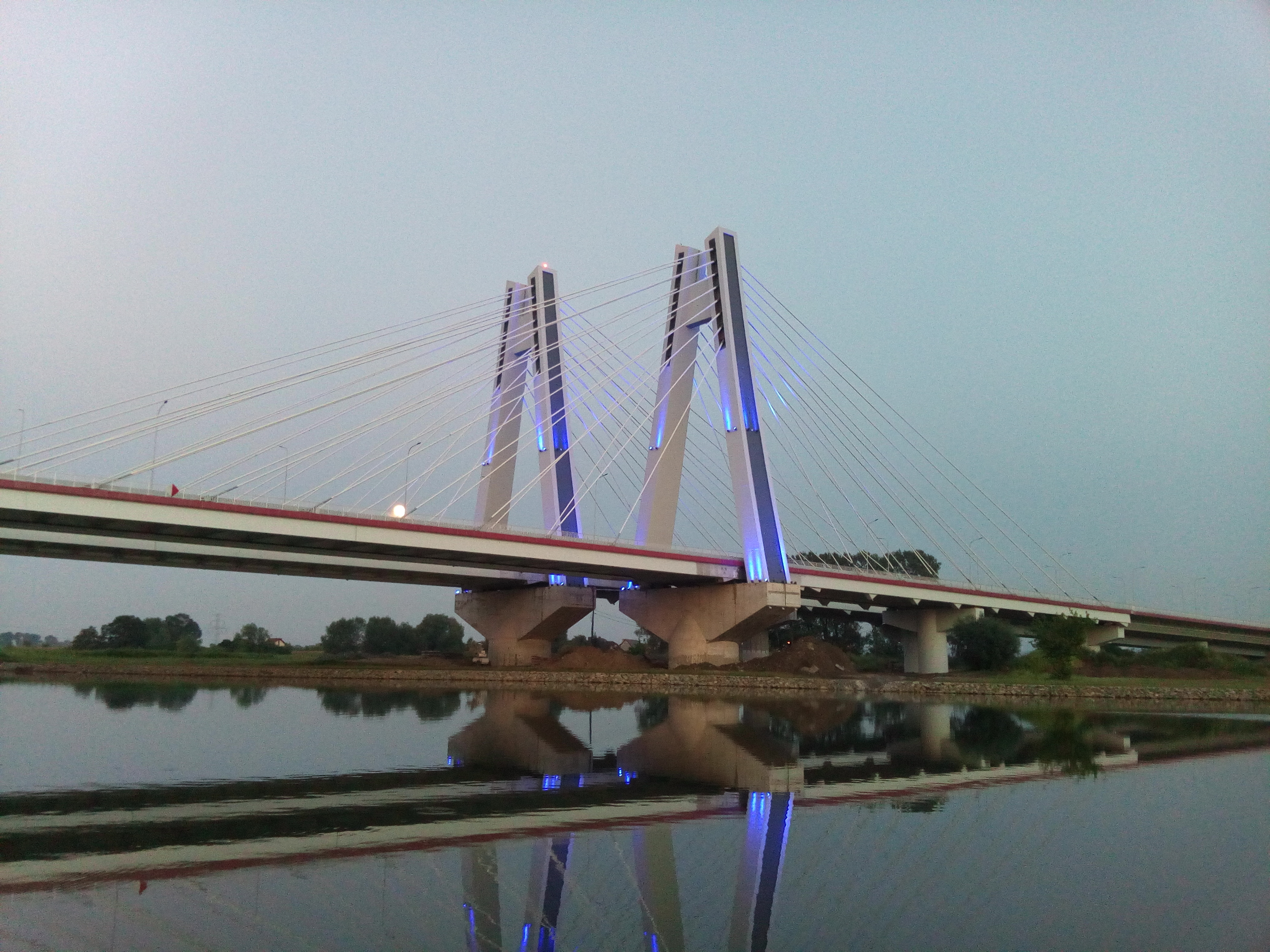 Podświetlenie niebieskie